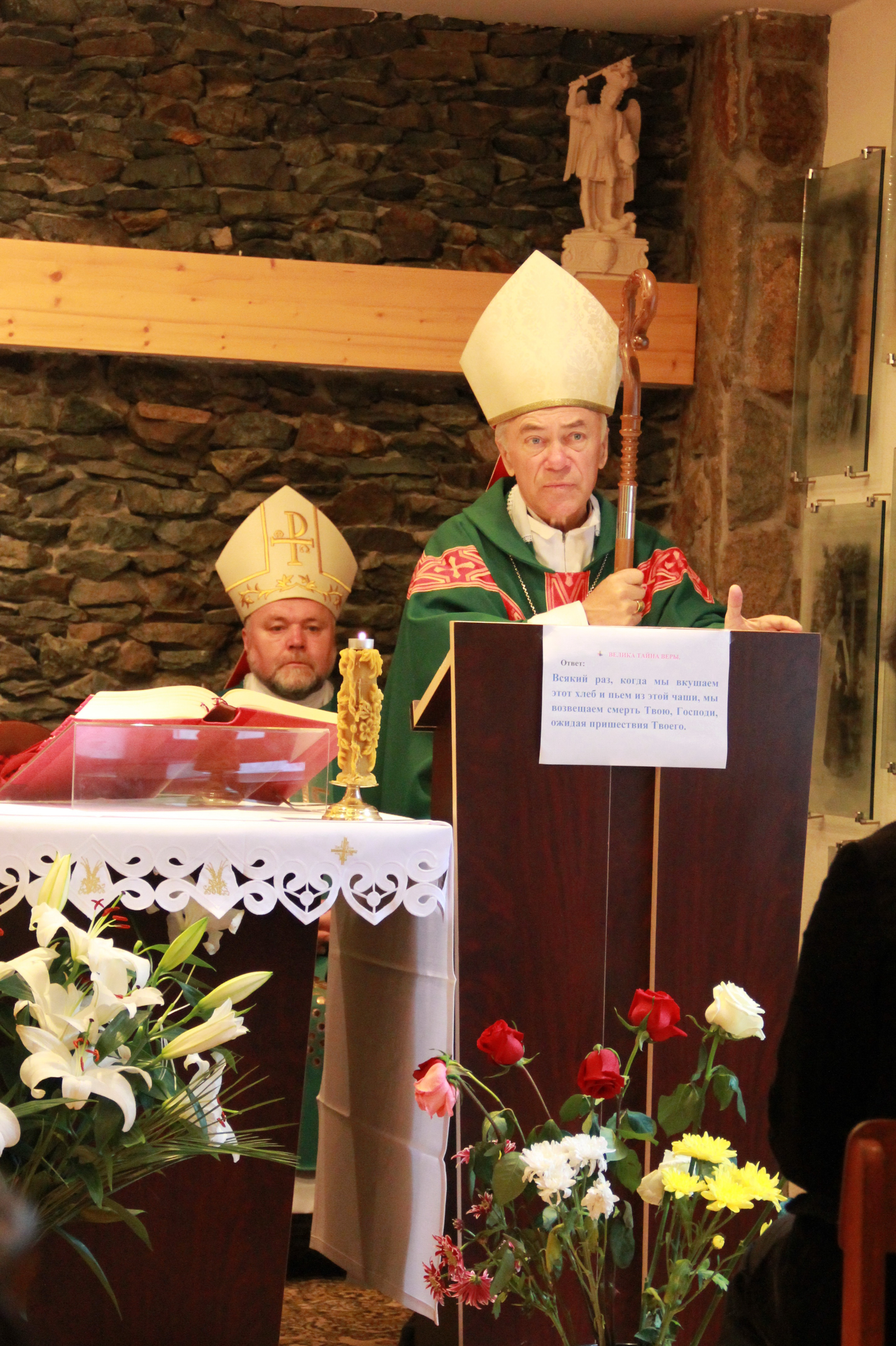 Ksiądz arcybiskup Paweł Lenga (na pierwszym planie), w głębi ks. bp Cyryl Klimowicz, biskup irkucki. Zdjęcie wykonano w kaplicy św. Teresy od Dzieciątka Jezus Doktora Kościoła w Pietropawłowsku Kamczackim